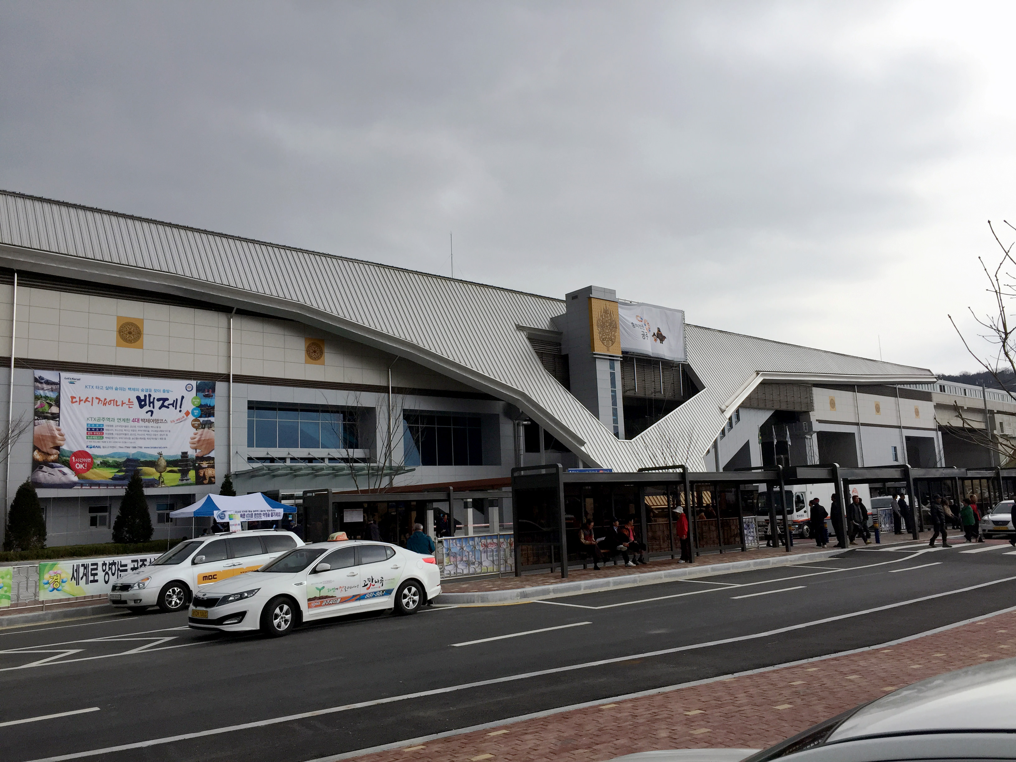 공주역 역사